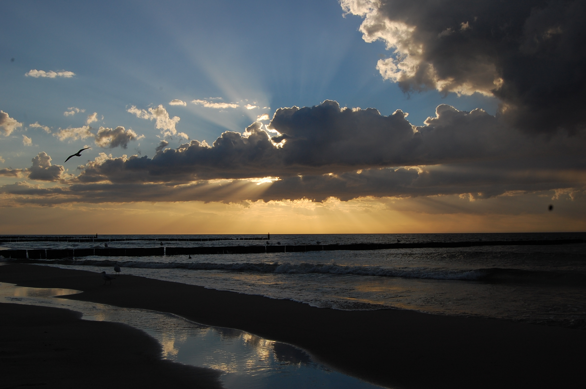 zachód słońca nad Bałtykiem